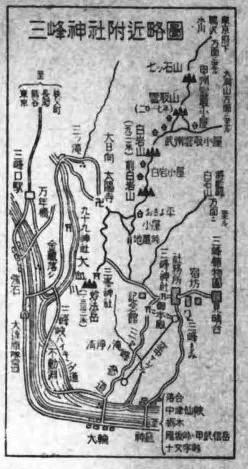 三峰神社付近略図。『神社詣で』(埼玉県観光協会編, 1938)